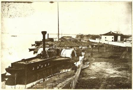 Набережная Днепра в Кременчуге после наводнения 1877 года